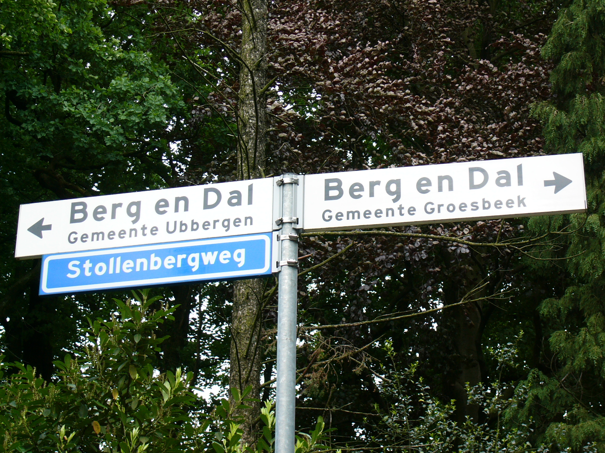 Richtingaanwijzers in Berg en Dal, gelegen in de gemeenten Groesbeek en Ubbergen Foto door Cicero